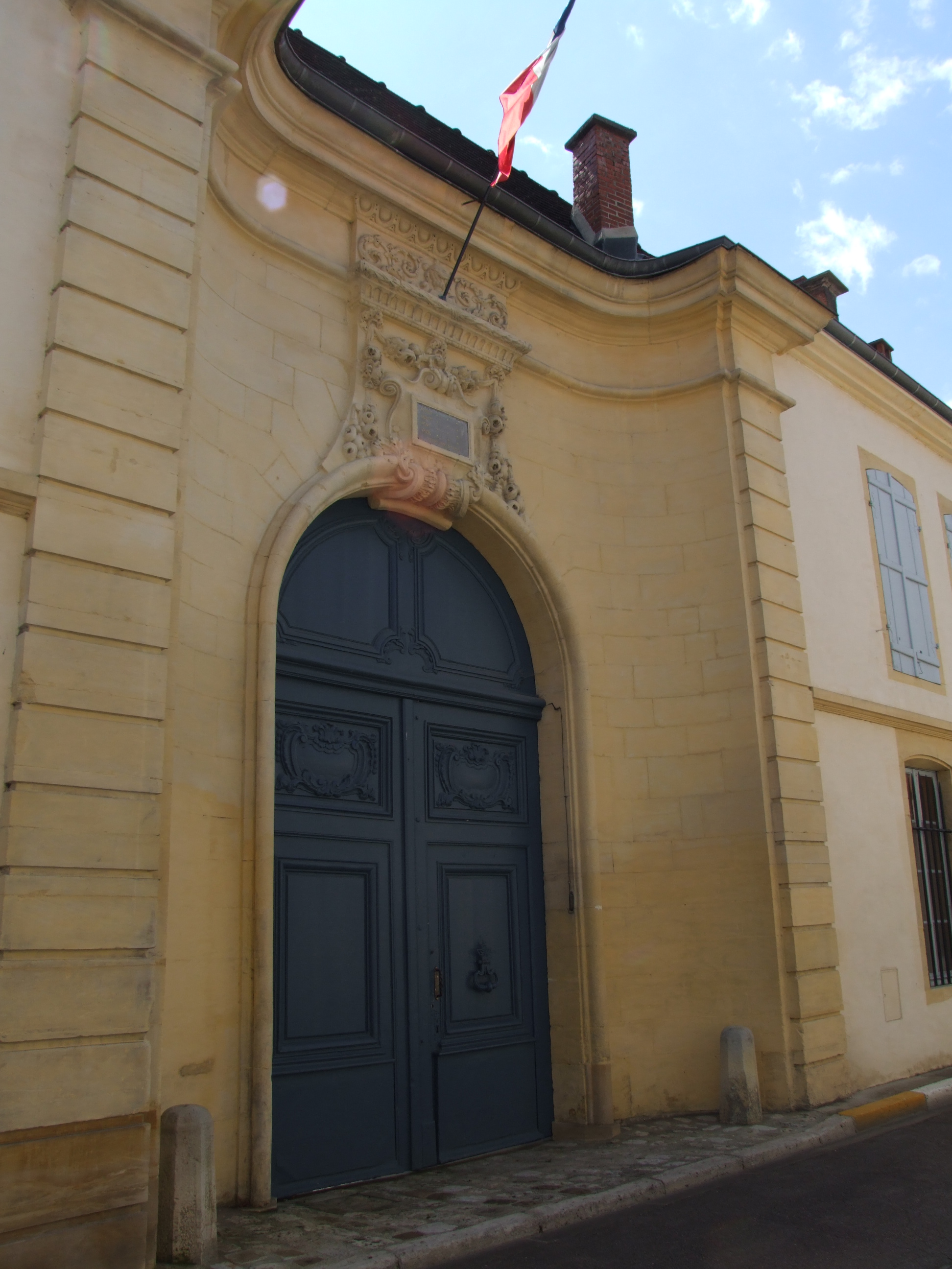 Bar-sur-Aube, Aube, Champagne-Ardennes, FRANCE